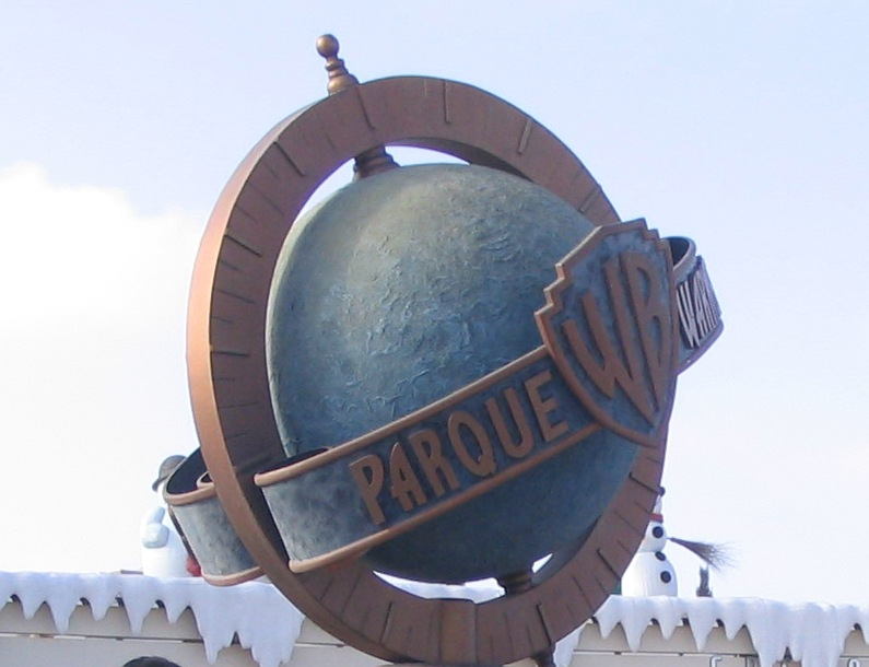 Insignia del Parque Warner (Madrid, España) en una escultura de la entrada.